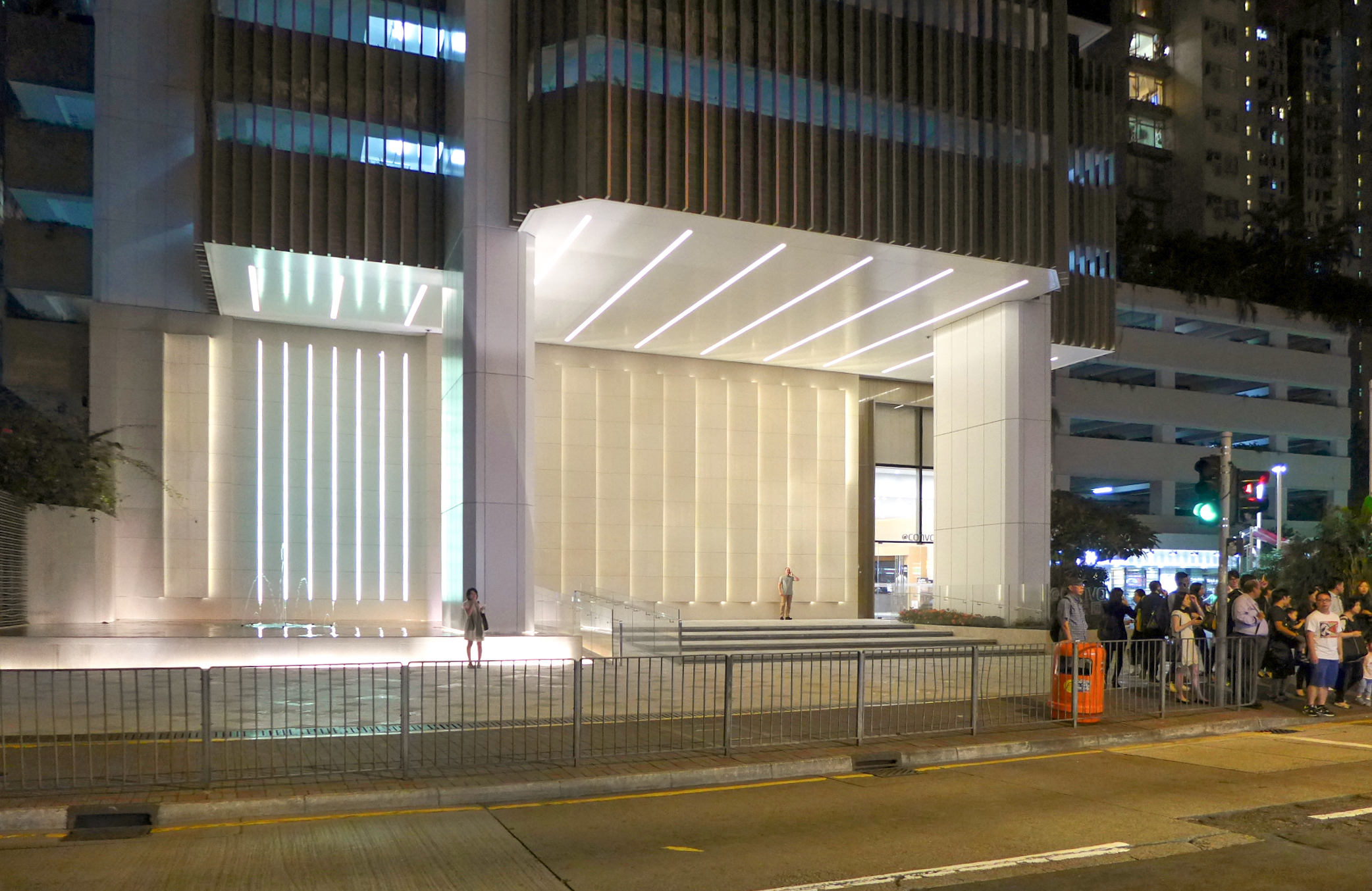 Convoy GF Plaza